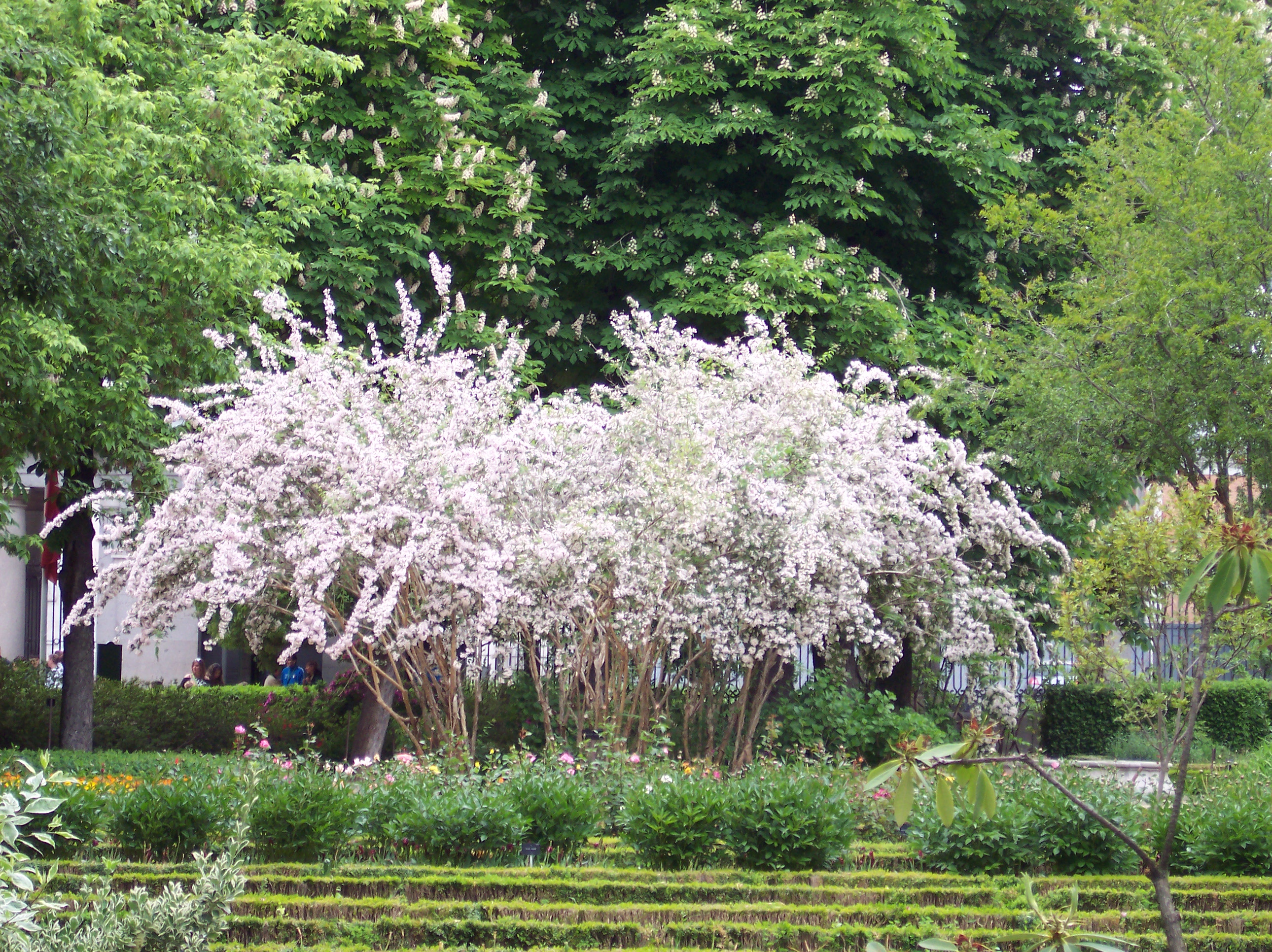 Kolkwitzia amabilis. Real Jardín Botánico de Madrid.